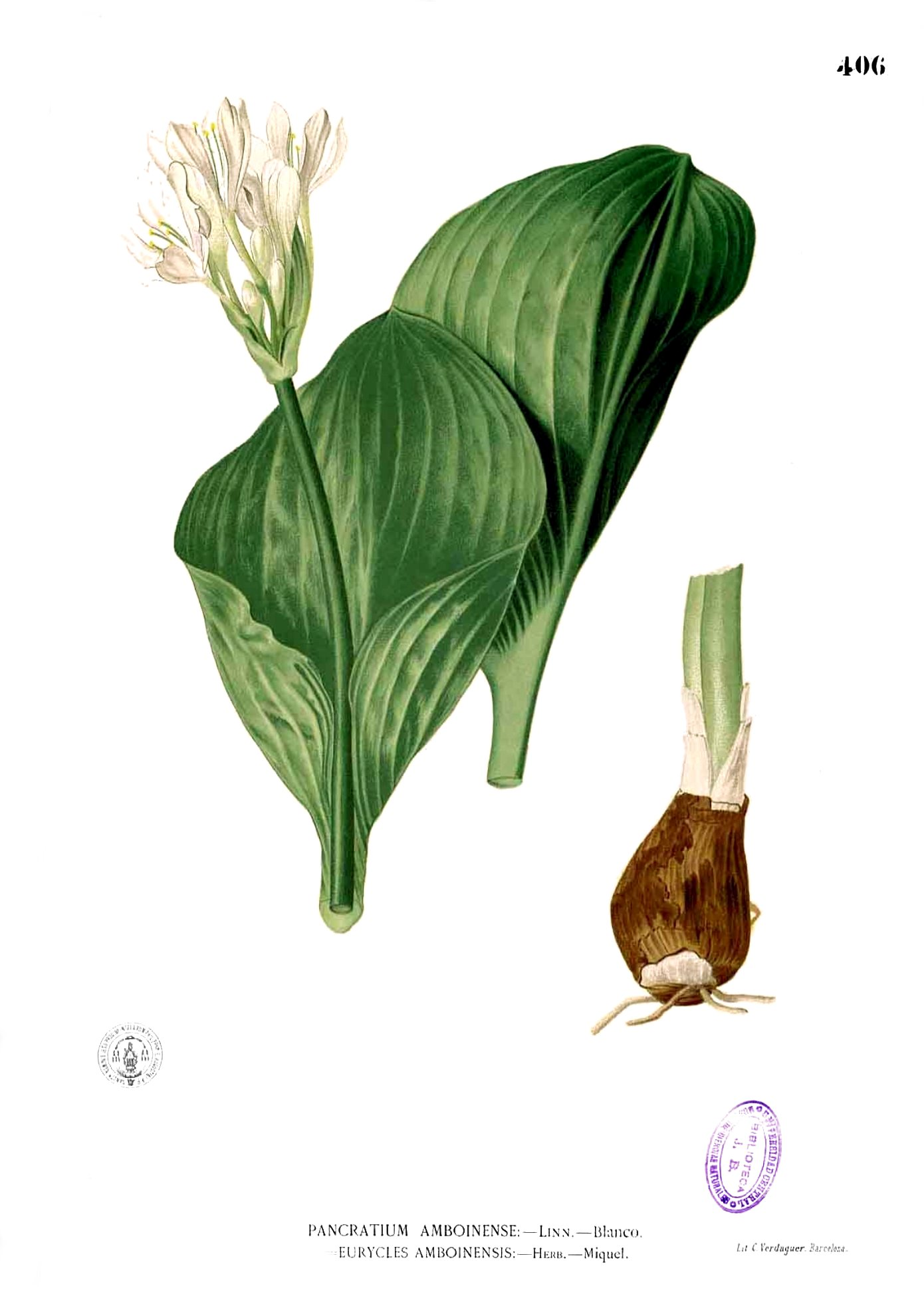 Proiphys amboinensis